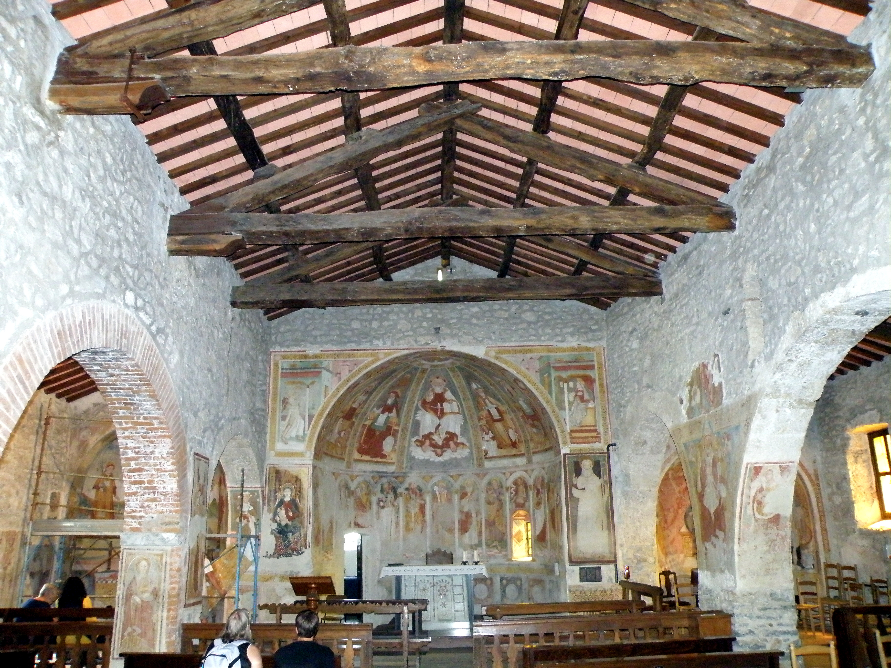 Gemonio, comm. italienne de la prov. de Varese. Église romane Saint-Pierre (chiesa di San Pietro), nef centrale.